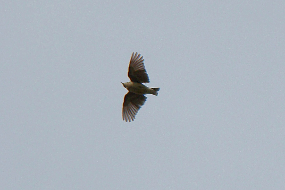 Heidelerche im Flug, "Southern Heath Nature Park"